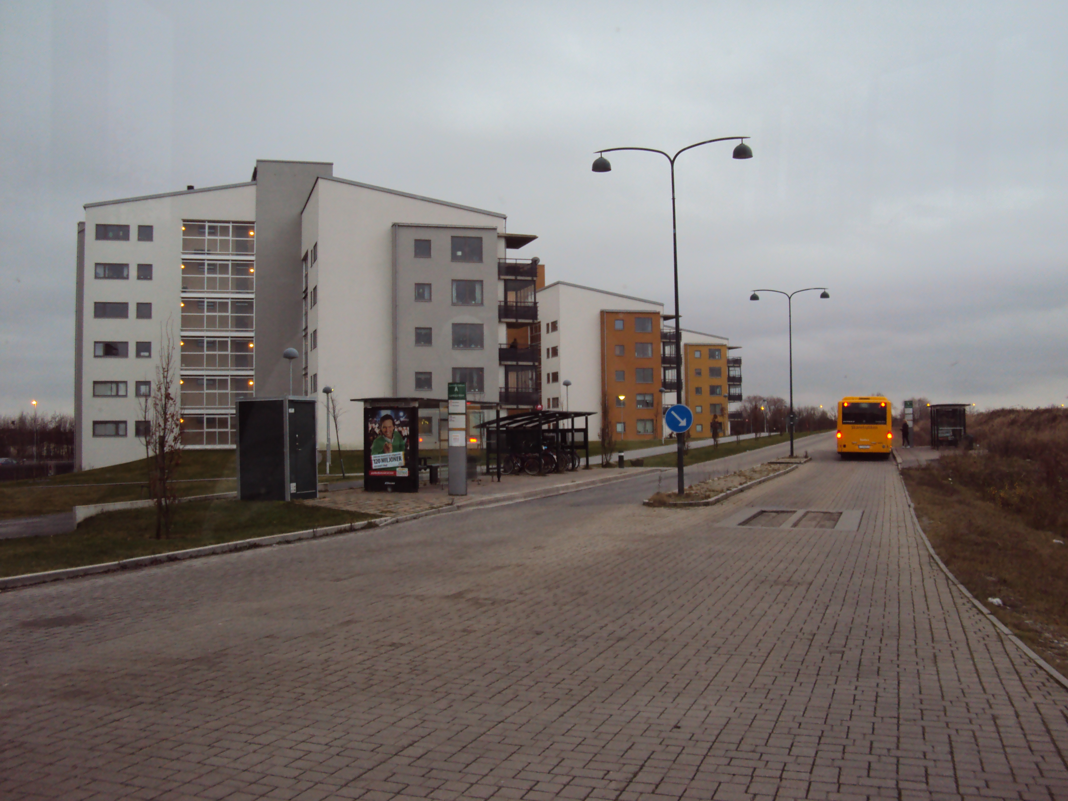 Några av bostadshusen på Brunnshög sett från busshållplatsen.